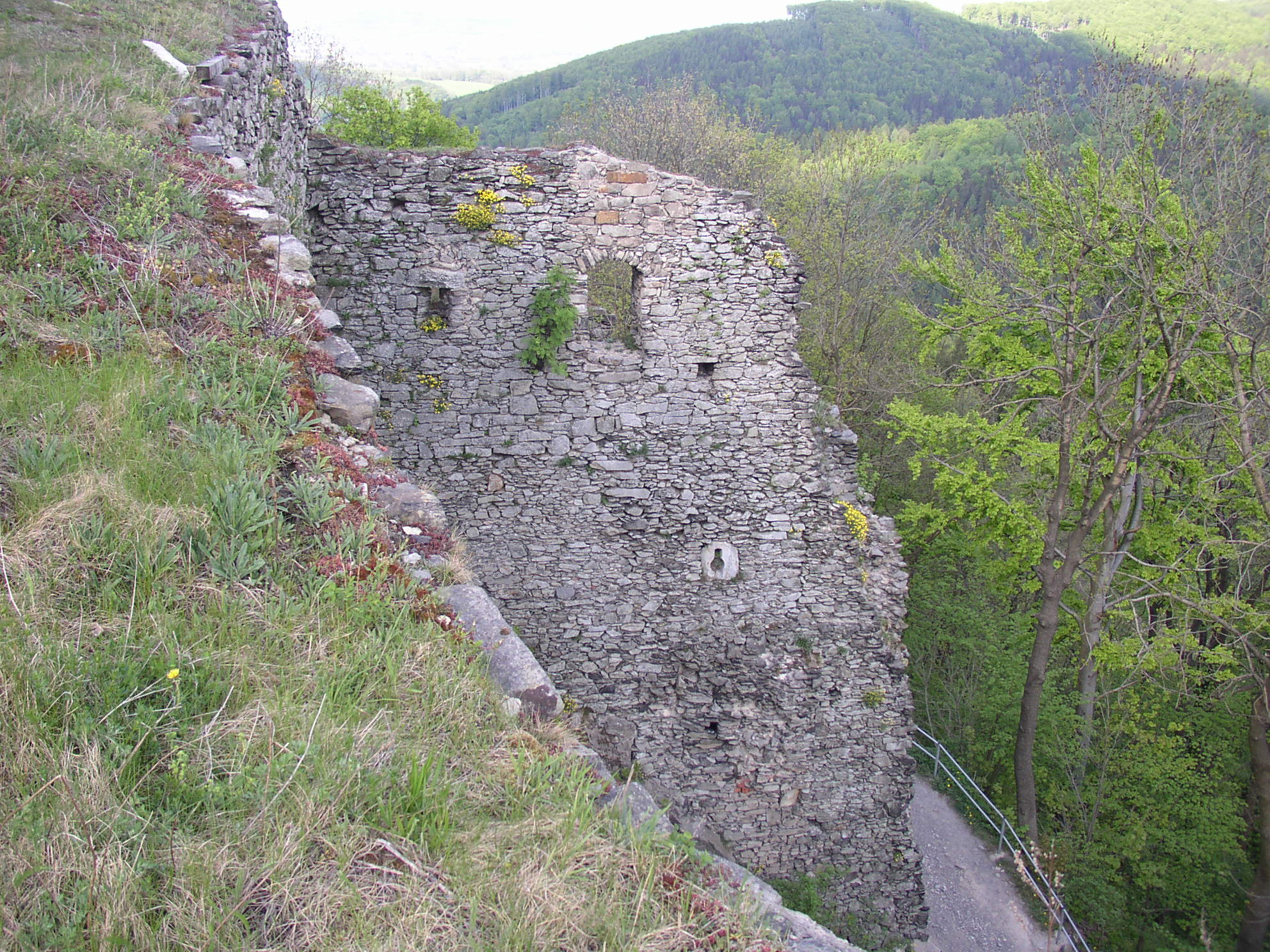 Pohled z hradeb Tolštejna na prostor bývalé brány